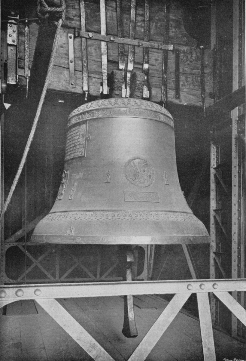 Praha, crám sv. Víta, zvon Zikmund